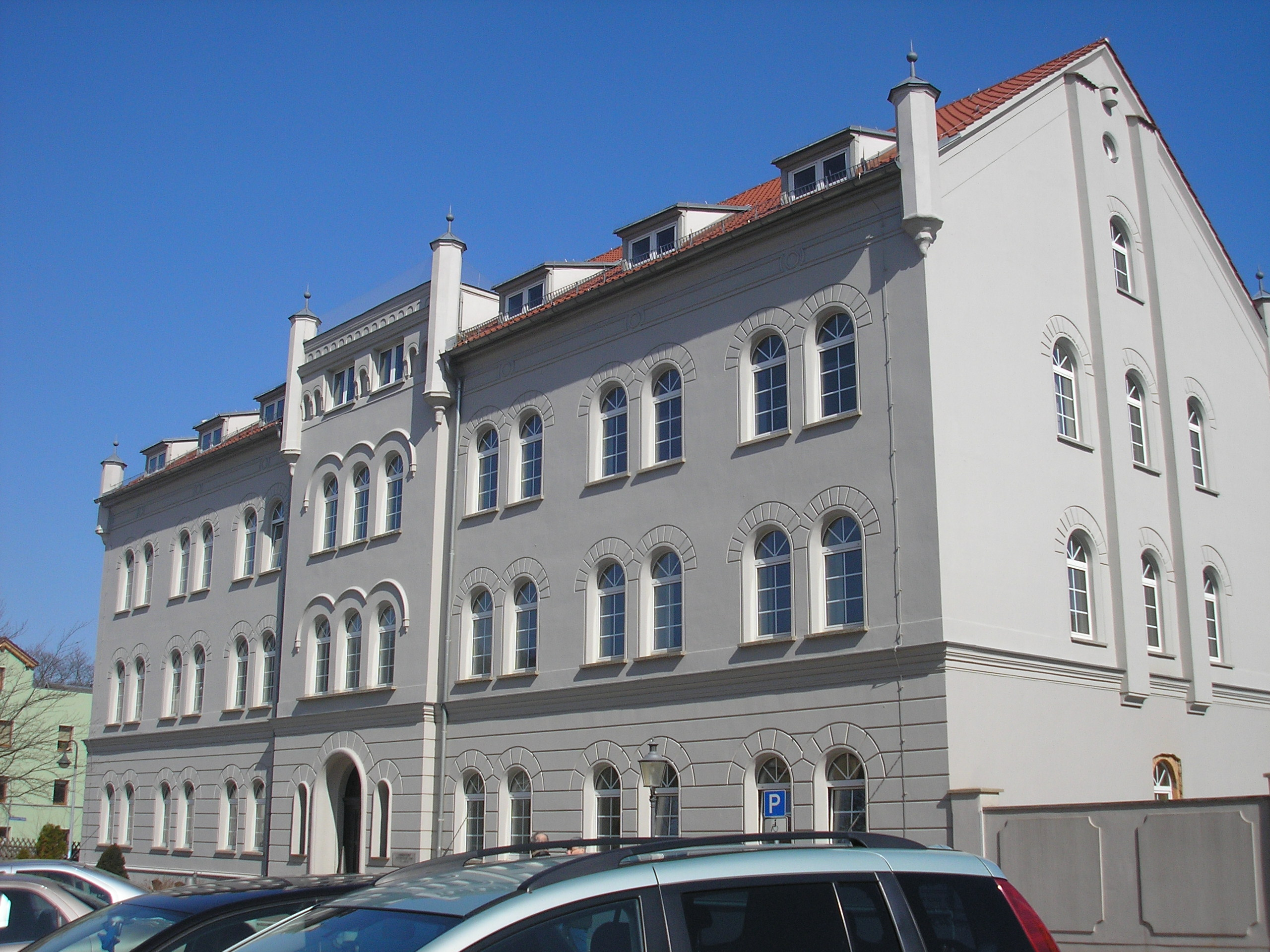 Die Außenstelle des Landratsamtes Altenburger Land in Schmölln/Thüringen, hier ist der Fachbereich 6 - Bauordnung und Umwelt untergebracht, der unter Anderem auch den Denkmalschutz einschließt.